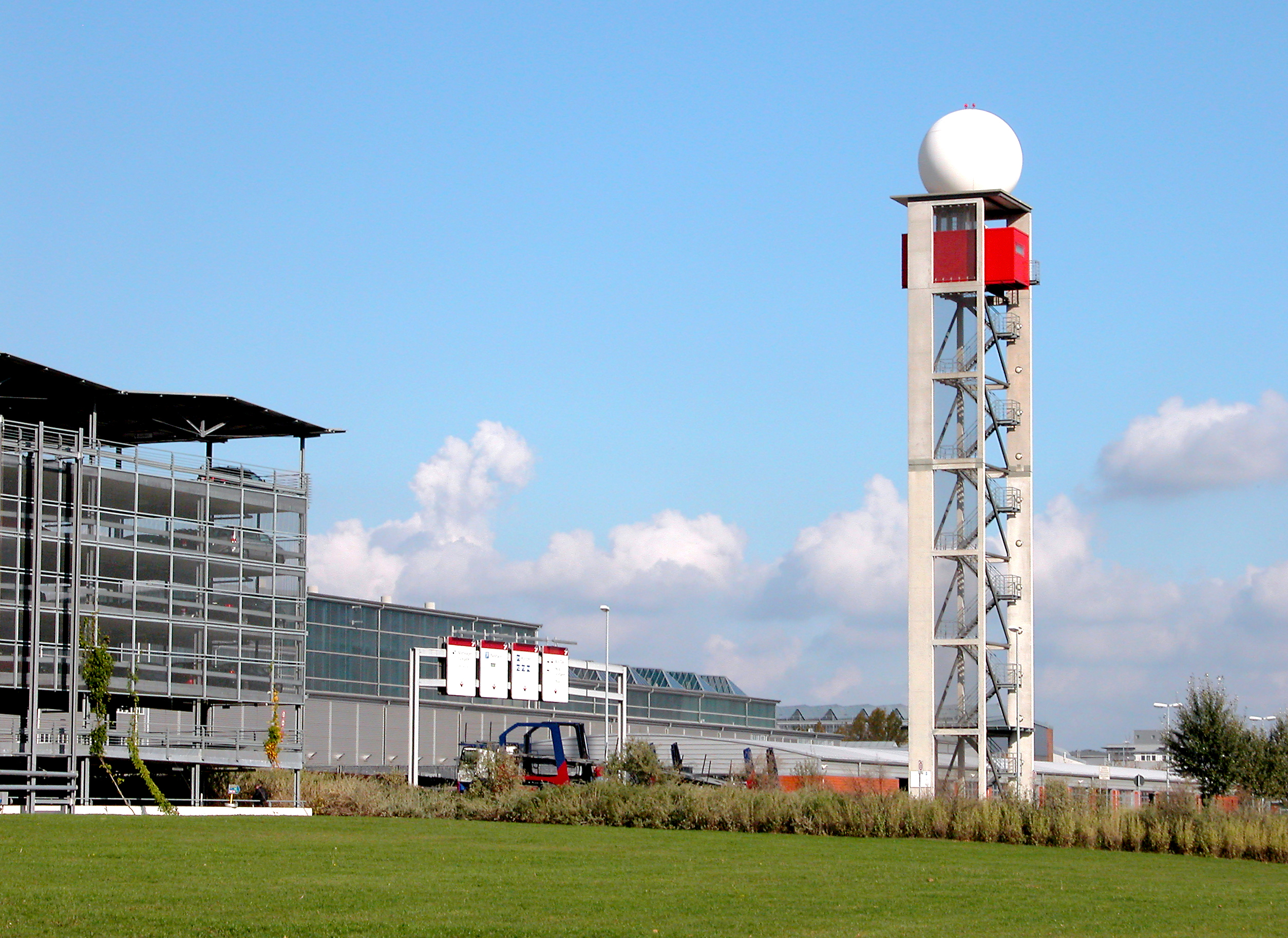 25.10.2006 Dresden-Klotzsche: Flughafen, Terminal 3 (GMP: 51.125110,13.764875) am Wilhelmine-Reichard-Ring. Das neue Abfertigungsgebäude wurde am 08.03.2001 eröffnet. Der neue Wetter-Radarturm (GMP: 51.124656,13.768624), architektonisches Wahrzeichen an der Zufahrt zum Terminal, wurde 2001 mit dem Erlweinpreis der Landeshauptstadt Dresden ausgezeichnet. [DSCN12235.TIF]20061025035DR.JPG(c)Blobelt